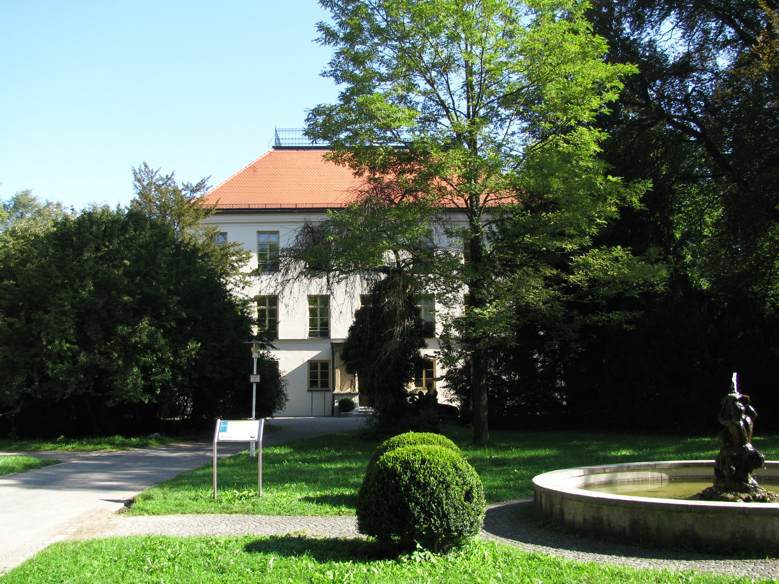 Schloss Fußberg; Ansicht von Süden